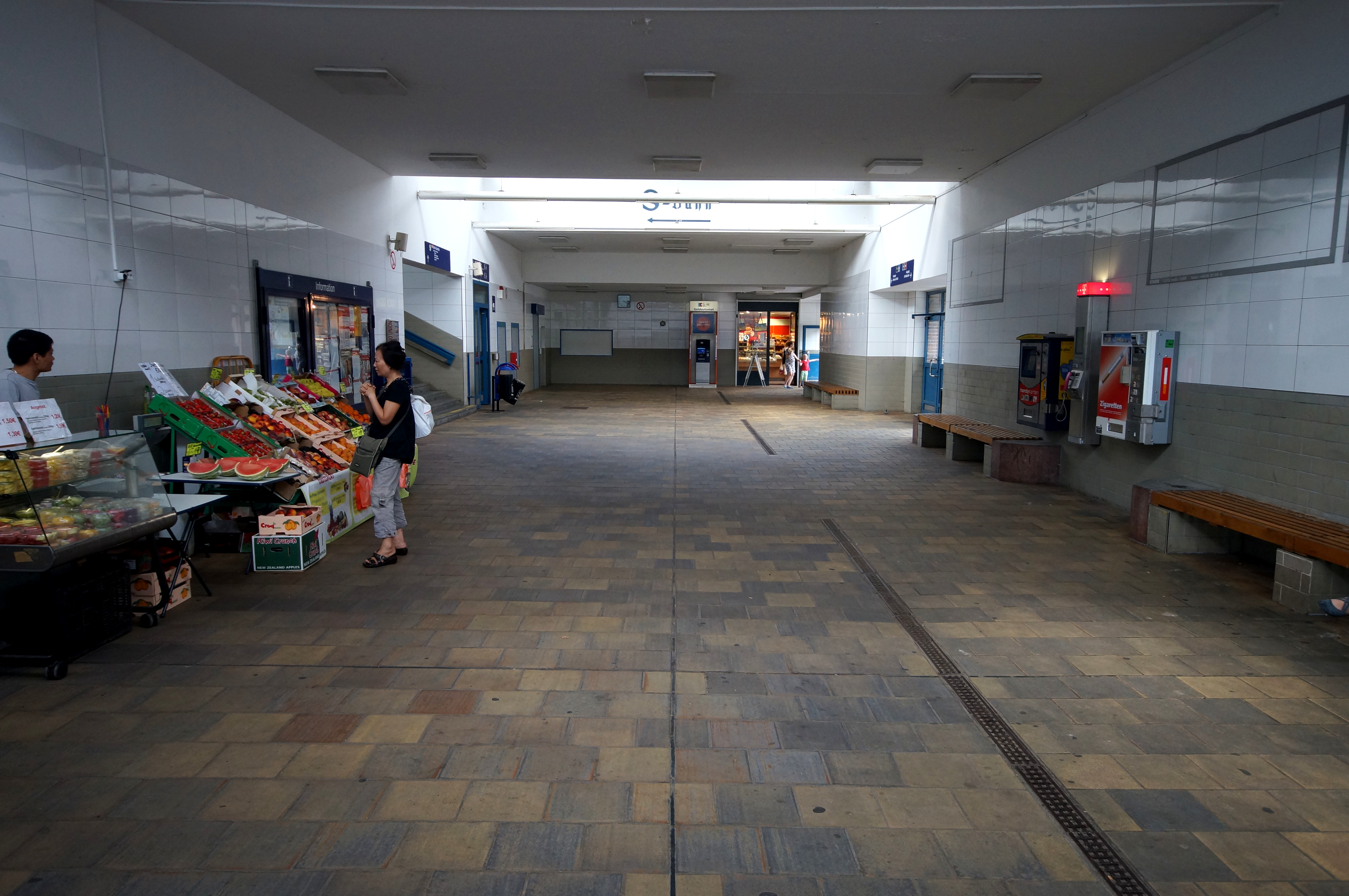 Haupthalle des Bahnhofsgebäudes des Bahnhofs Berlin-Mahlsdorf